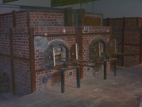 Verbrennungsofen des Krematoriums in Dachau (heute Teil der Gedenkstätte)